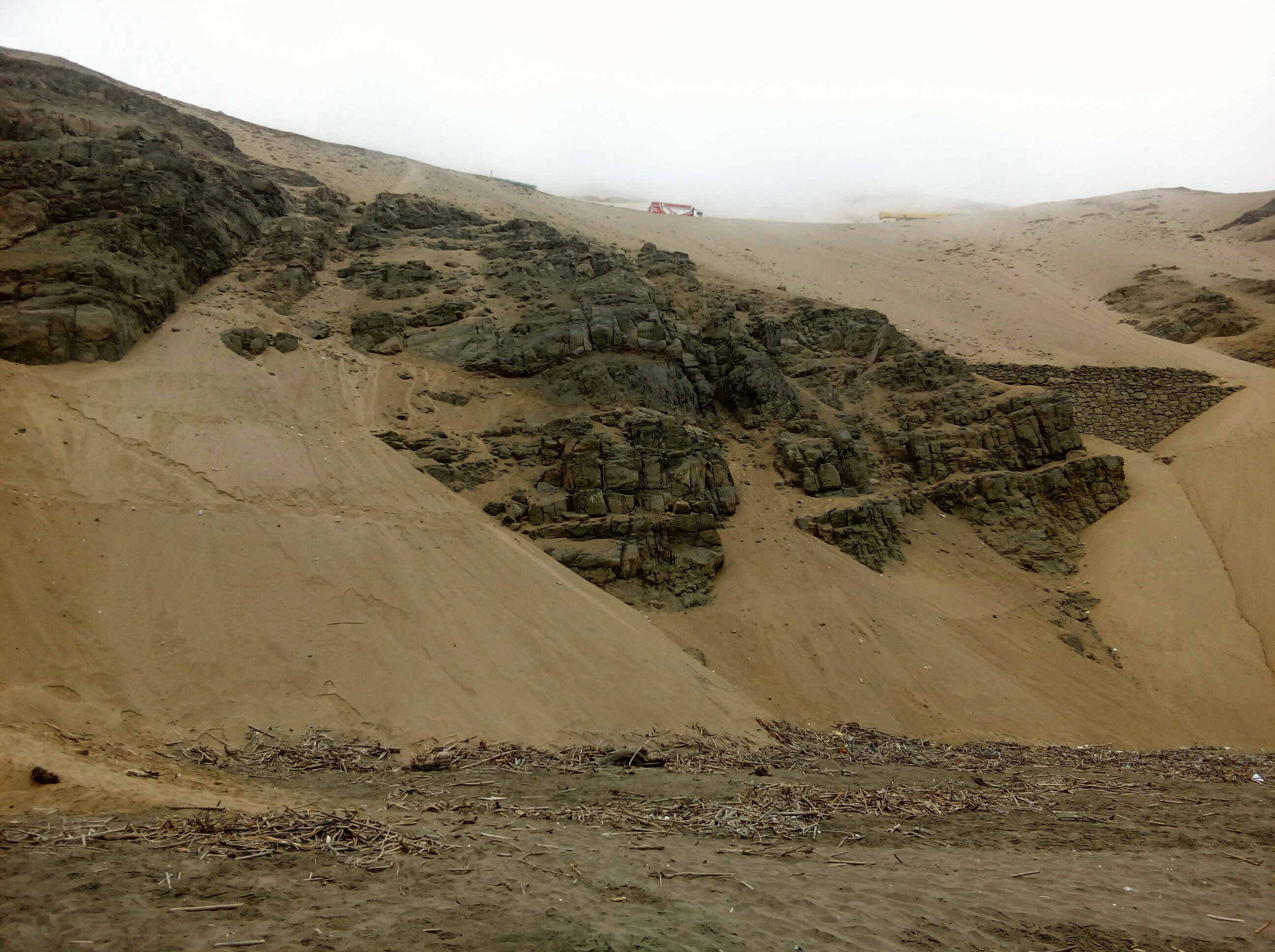 El Barranco de Pasamayo cerca al lugar del accidente. En la parte de arriba se ven camiones pasando por el lugar, antes del accidente los buses interprovinciales estaban permitidos de usar esa ruta.